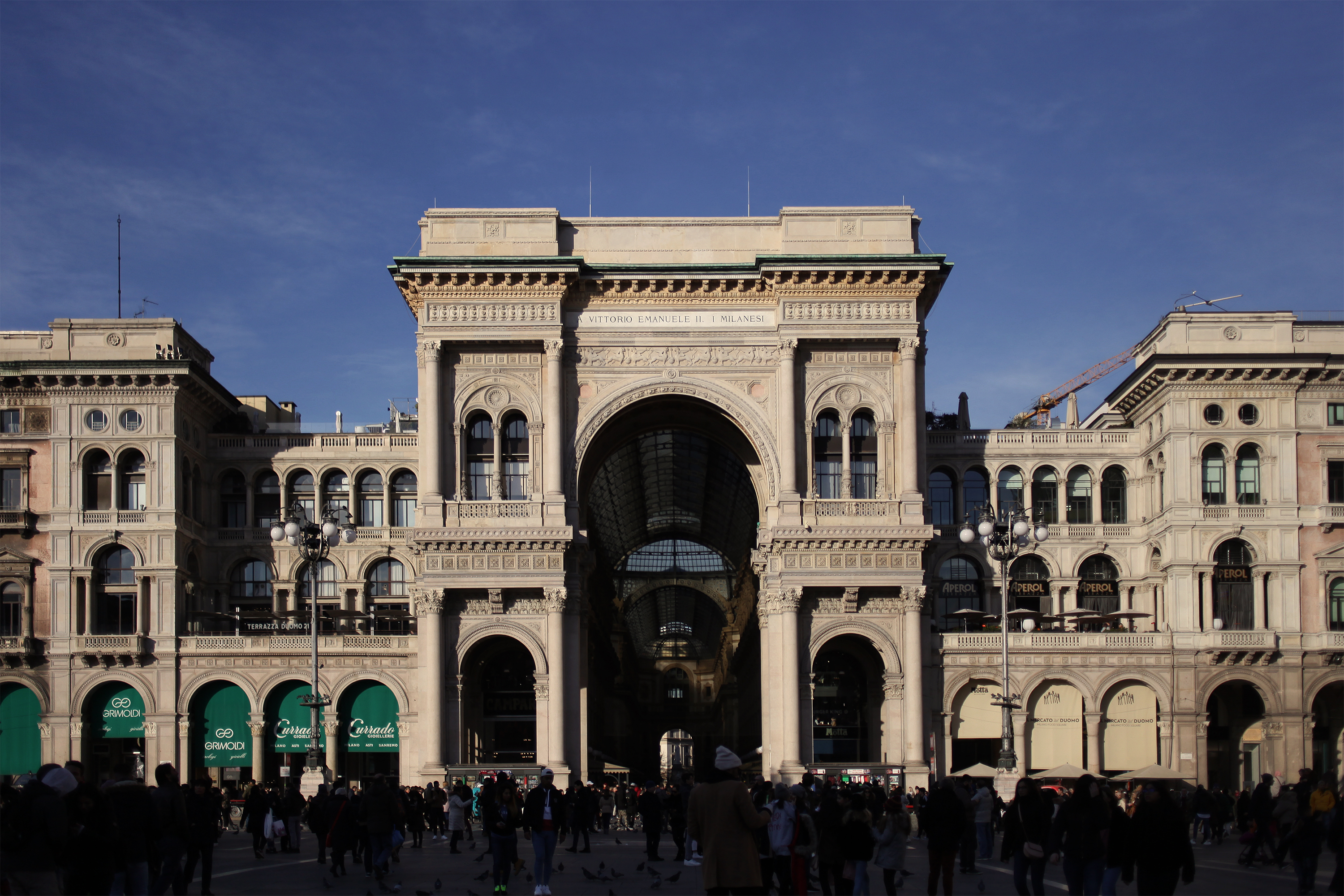 Galleria Vittorio Emanuele II, Milano, veduta dal sagrato del Duomo